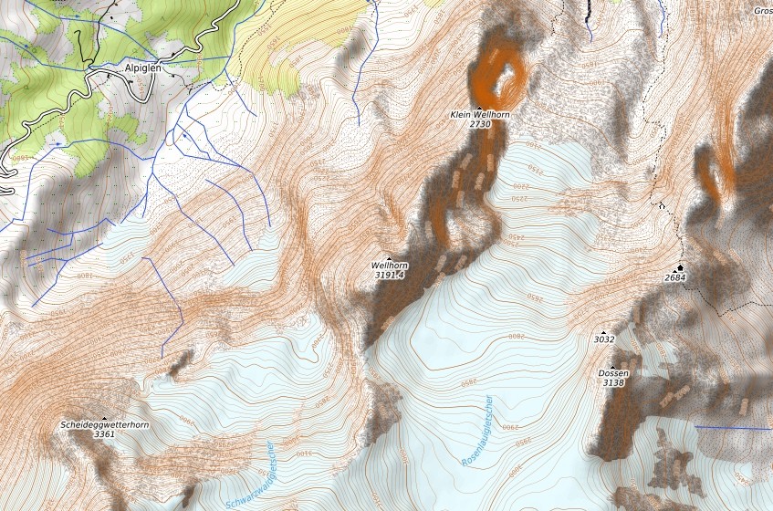 carte réalisée sur umap This map may be incomplete, and may contain errors. Don't rely solely on it for navigation.